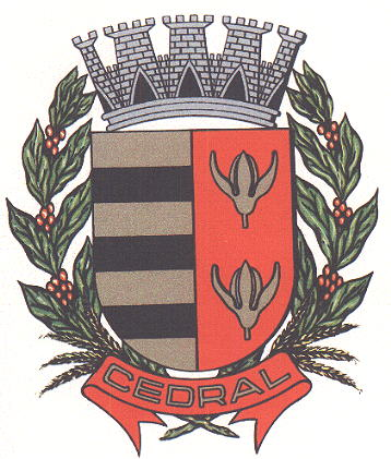 Brasão da cidade de Cedral, SP